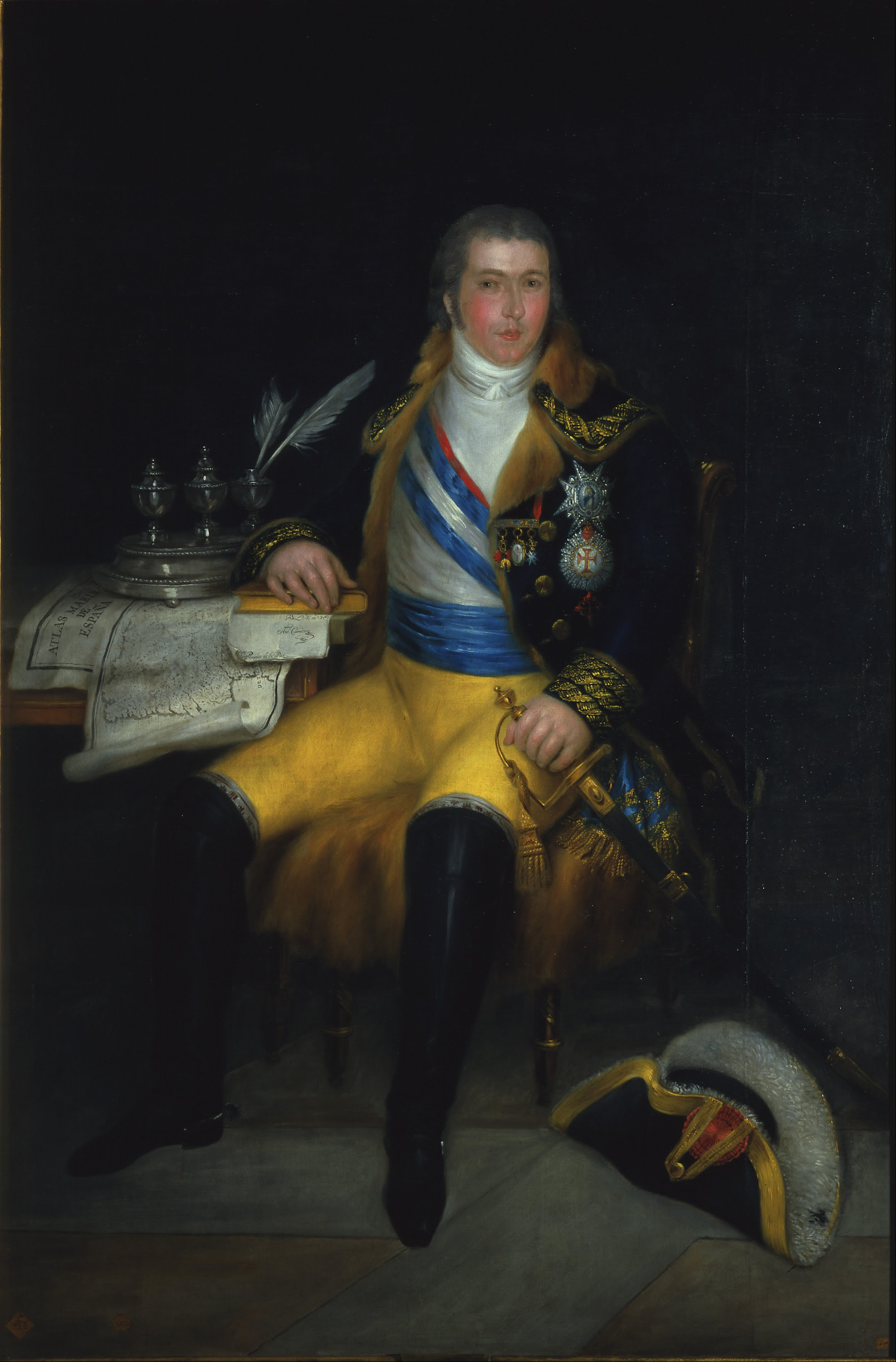 Retrato del politico y militar español Manuel de Godoy (1767-1851), que fue valido del rey Carlos IV de España.